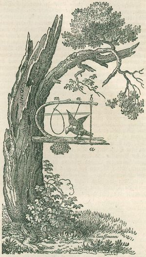 Der Vogel gerät in die Schlinge, wenn er sich nach der ausgelegten Lockspeise bückt und erstickt umso schneller, je mehr er flattert.